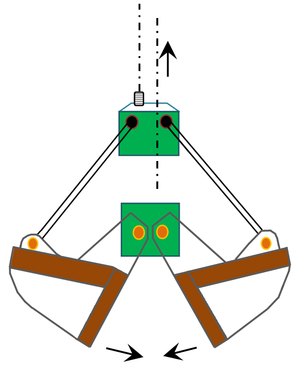 2х-канатный грейфер - операция 3